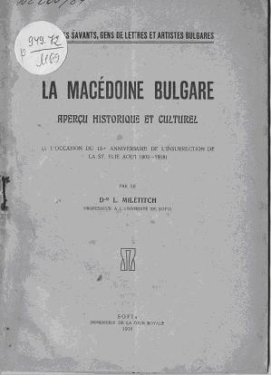 Корица на "La Macédoine Bulgare"